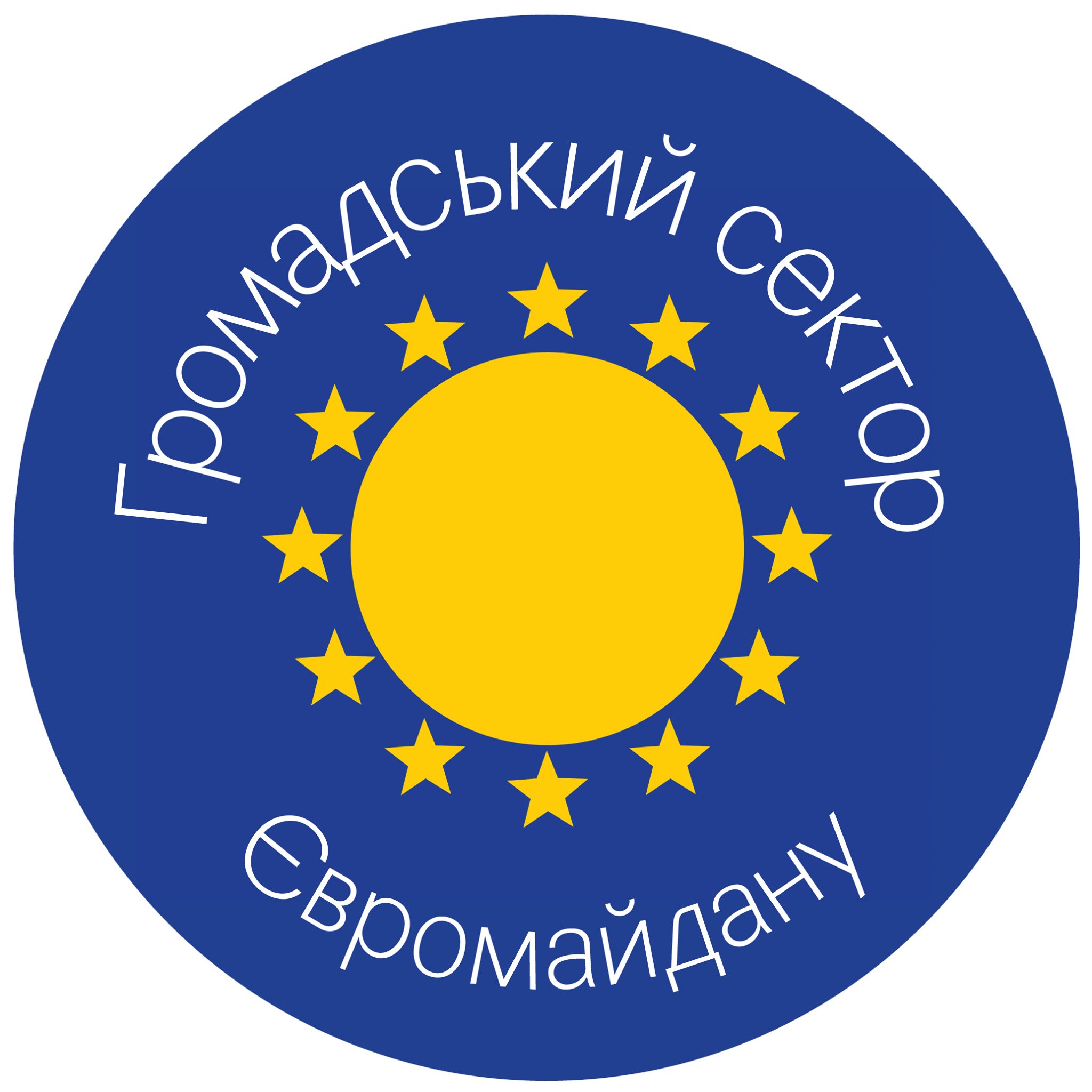 Логотип Громадського сектору Євромайдану